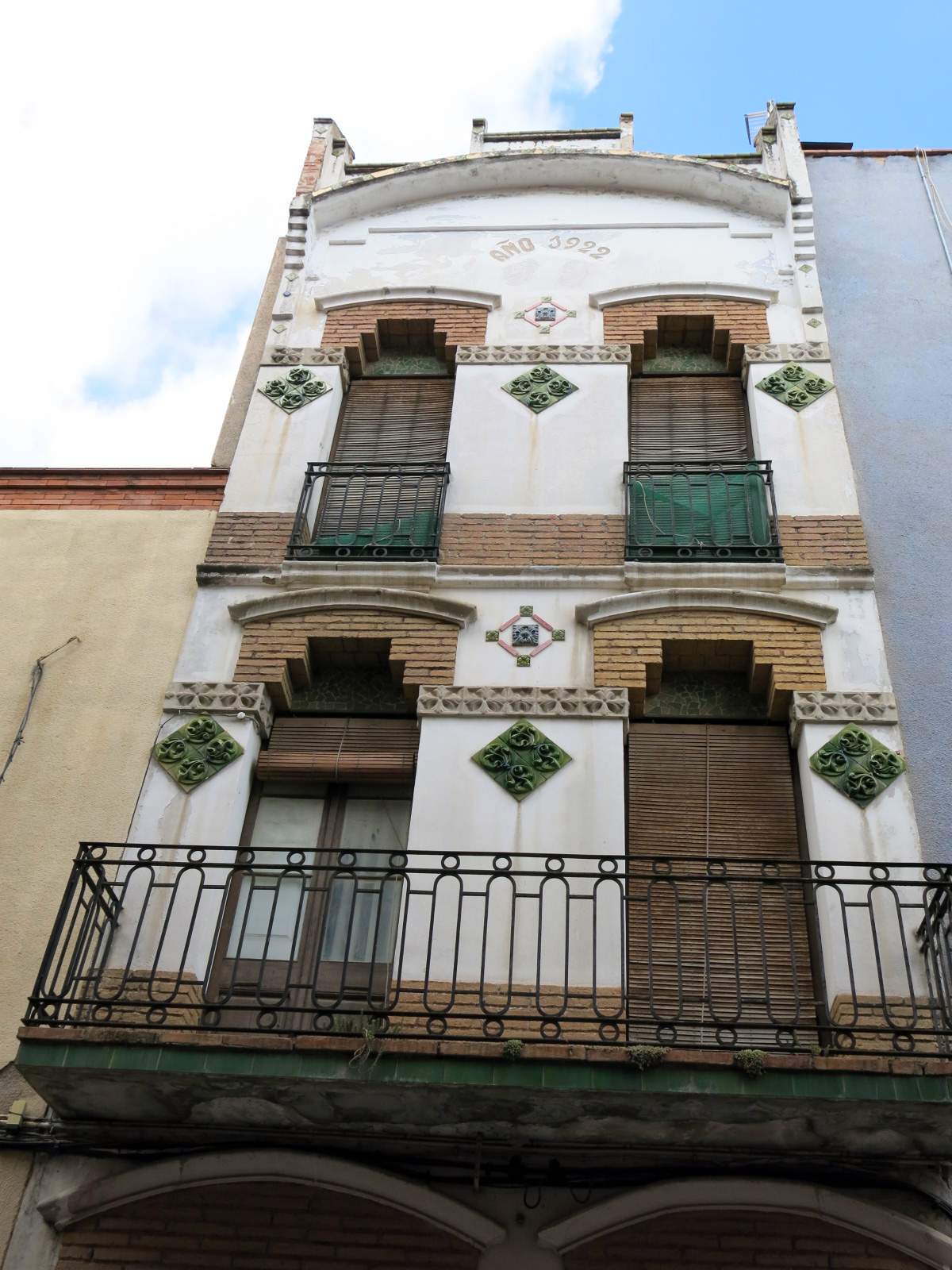 Habitatge al carrer Montserrat, 18 (Esparreguera)